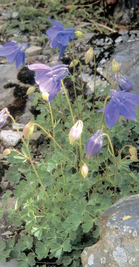 Aquilegia pyrenaica photographiée dans les Pyrénées